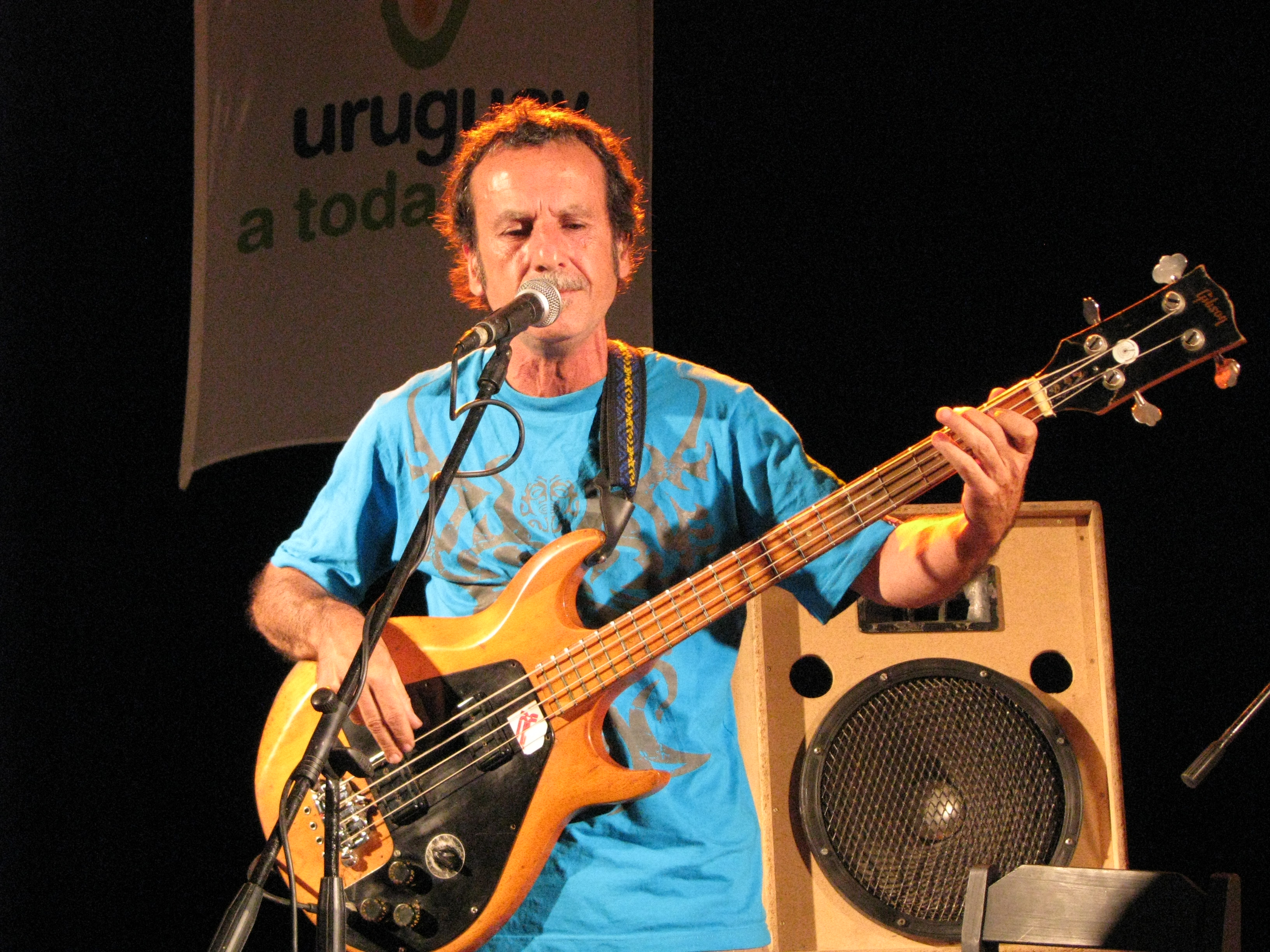 Fotografía de un concierto brindado por el músico uruguayo Beto Satragni en Atántida (Canelones - Uruguay) en el marco del programa “Uruguay a toda Costa”